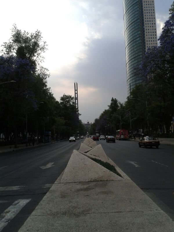 Camellón en Paseo de la Reforma